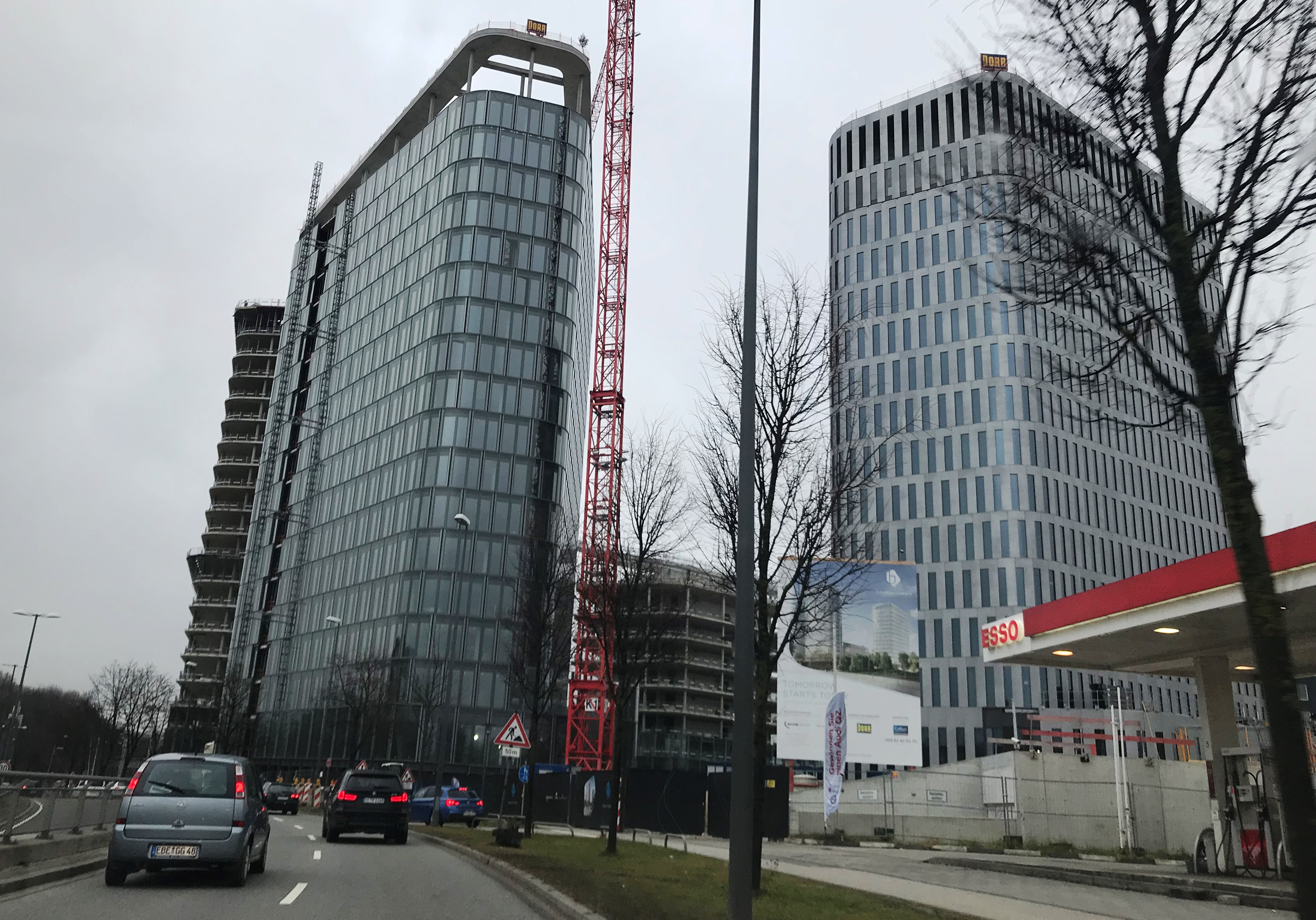 Zentrale der Fa. PORR in München